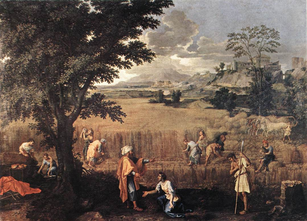 Landscape